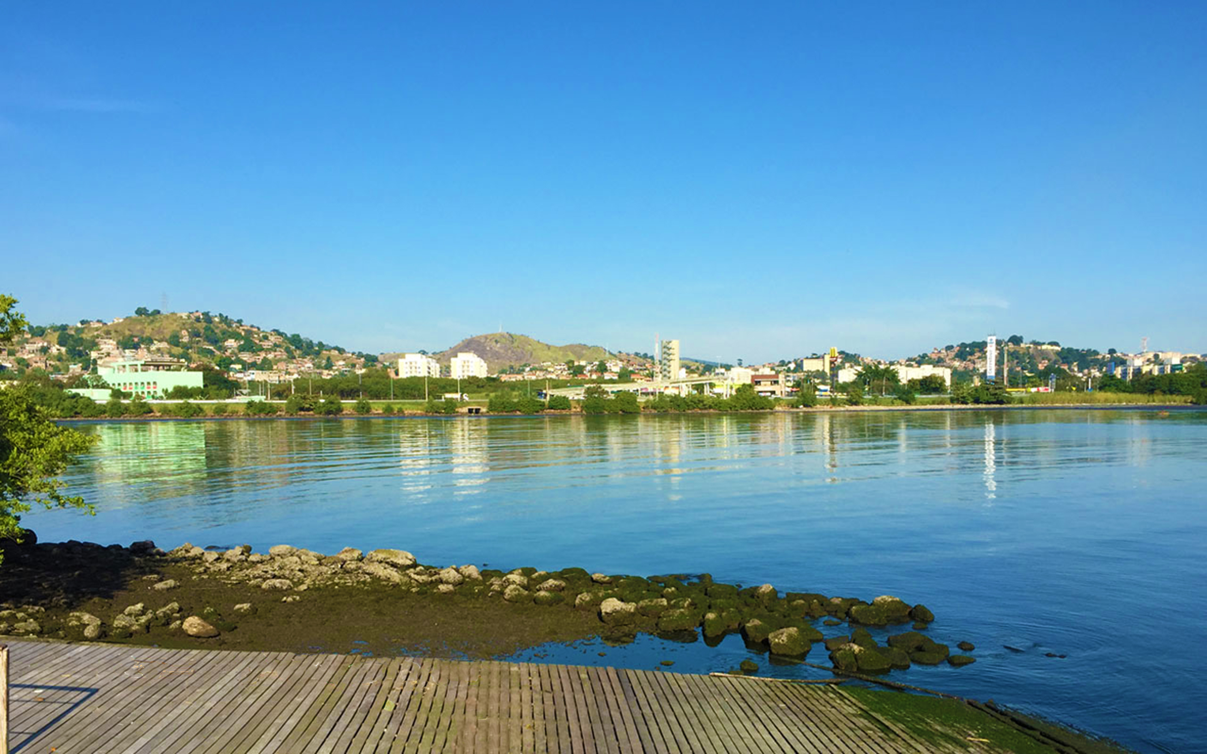 Orla de Neves, vista da Ilha das Flores, no Rio de Janeiro.